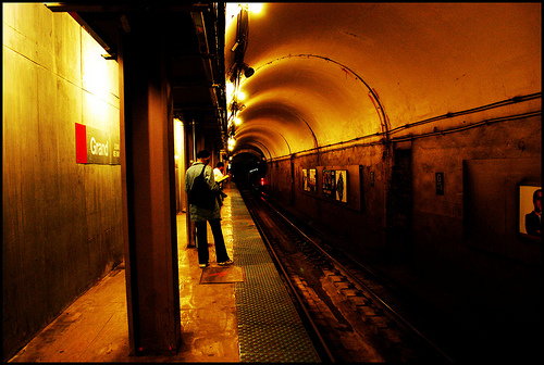 Photo de la station Grand sur la ligne rouge